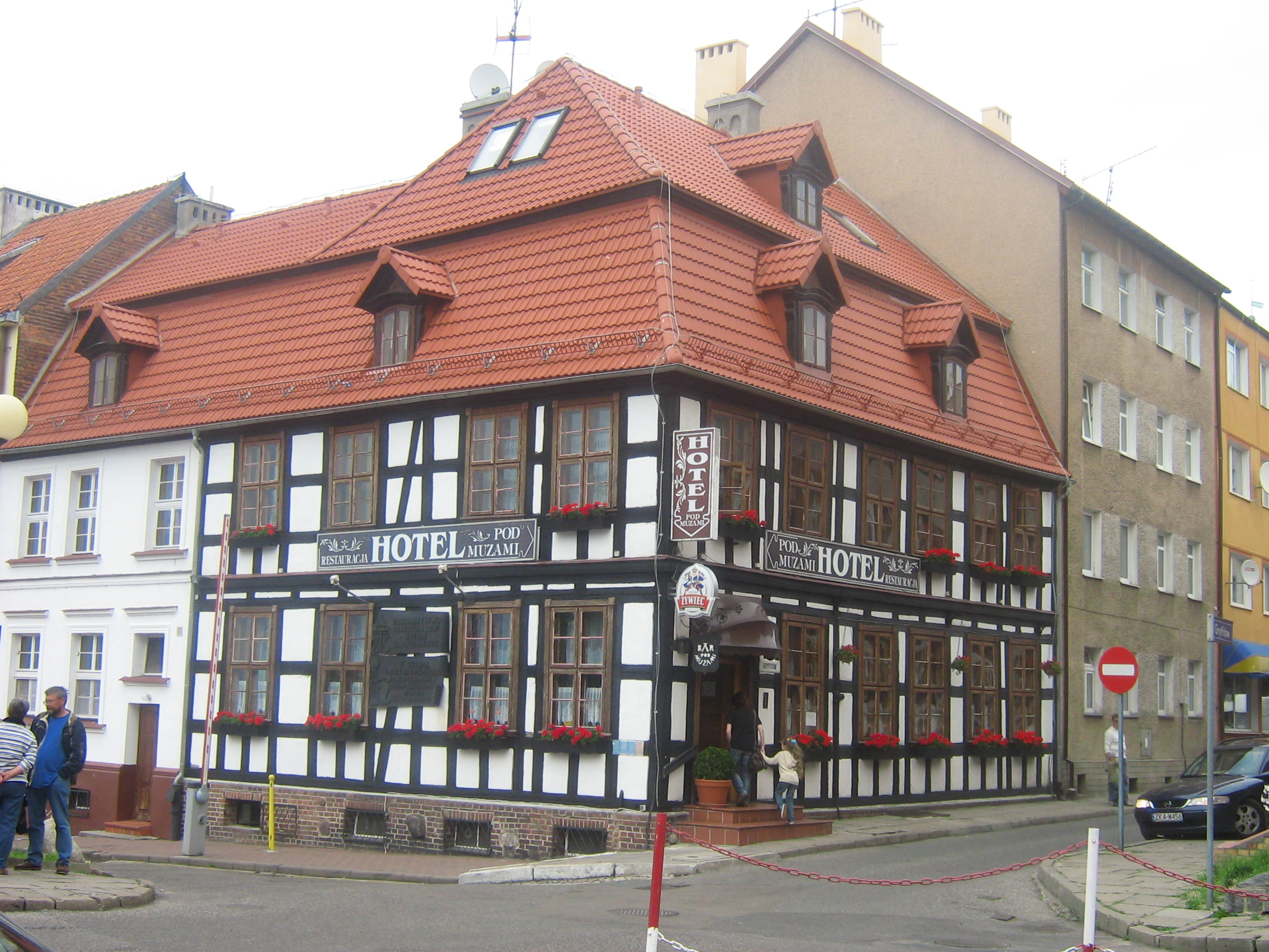 Hotel pod Muzami w Kamieniu Pomorskim